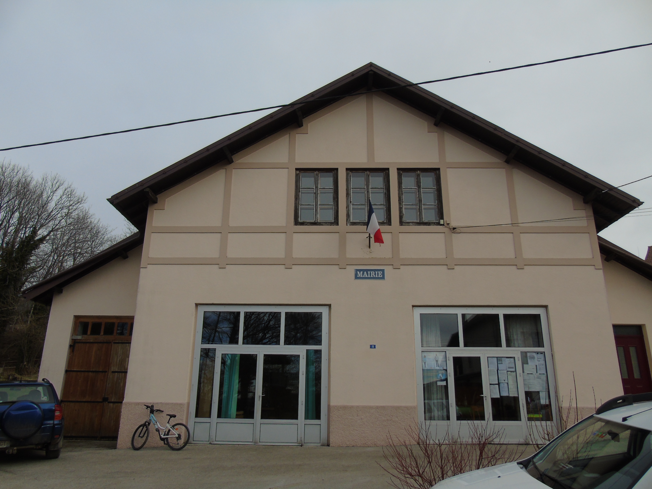 Mairie de Belfays, Doubs, France